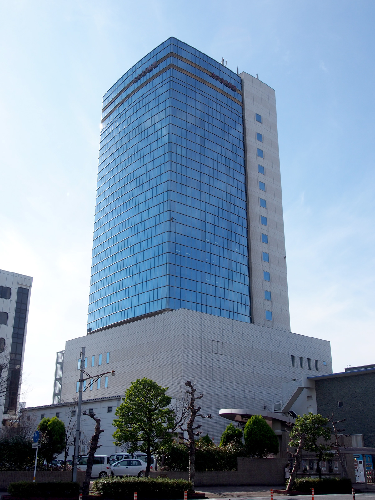 大分合同新聞社本社ビル（大分県大分市）